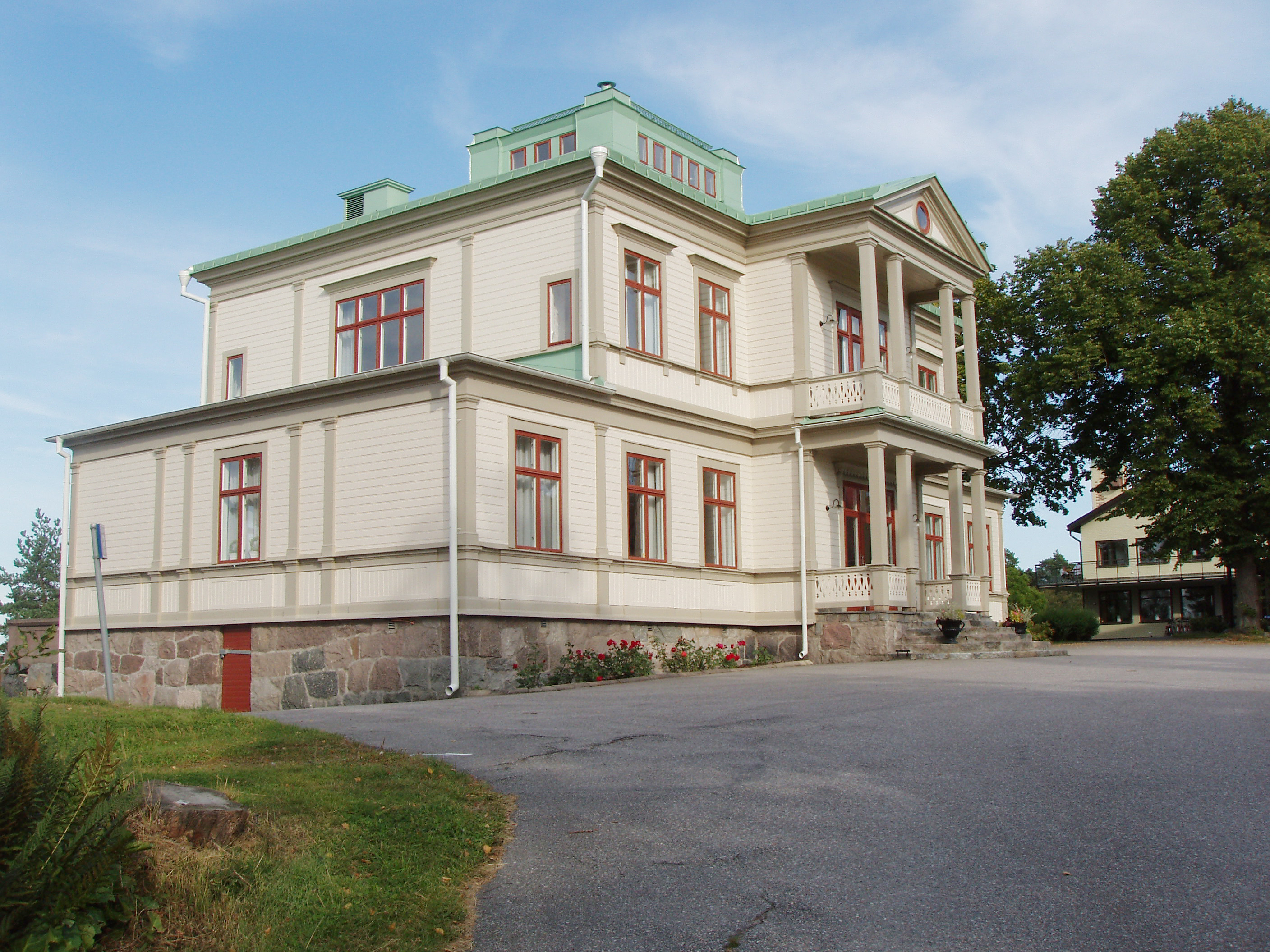 Sommarvilla uppförd av Carl Fredrik Falkman på Södergarn på Lidingö 1888.